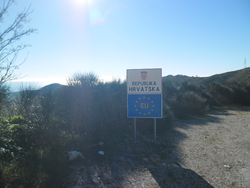 ulaz u Republiku Hrvatsku, granični prijelaz Brgat